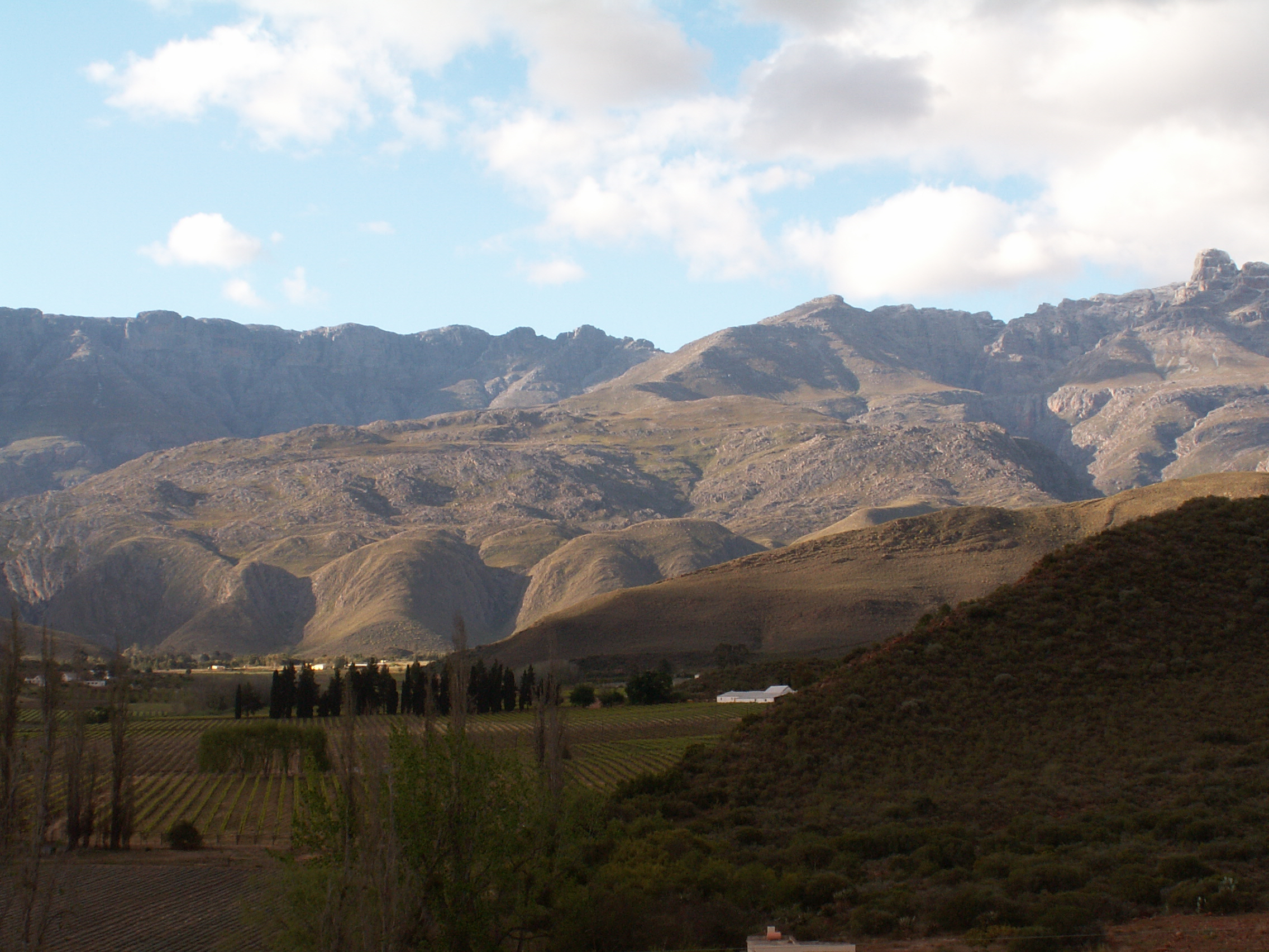 Ladismith, Kleine Karoo